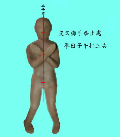 午線